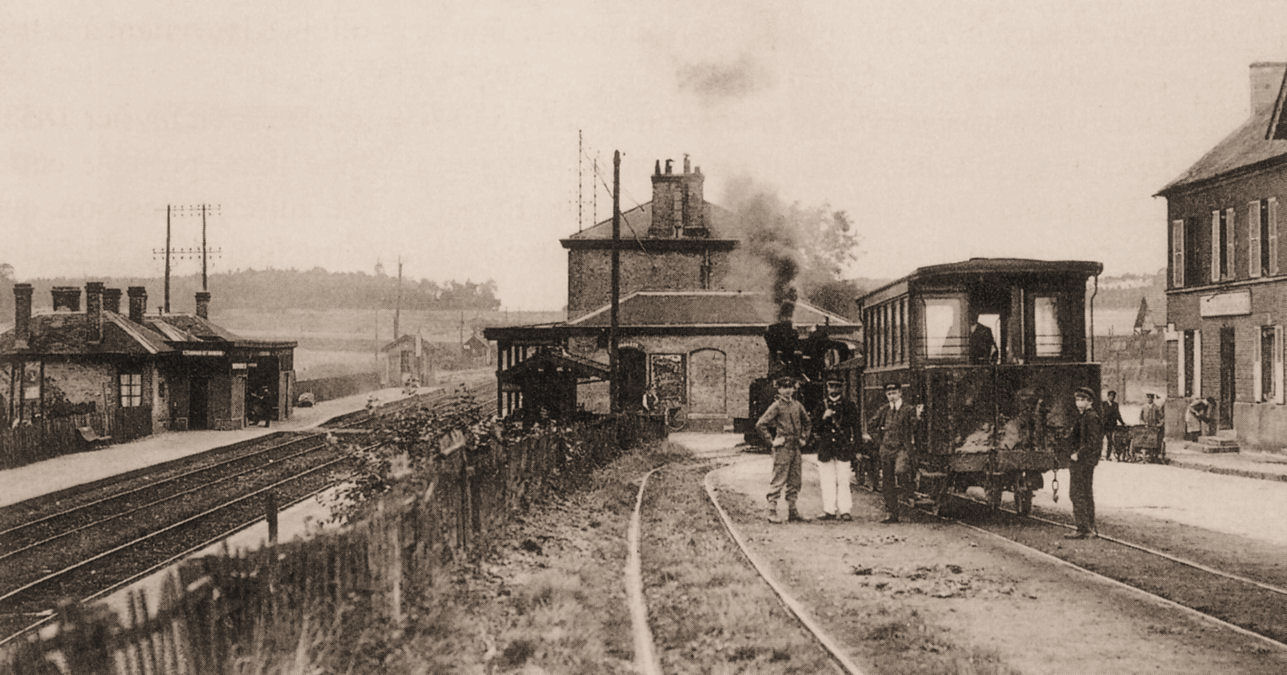 Gare d'Etainhus-Saint-Romain sur la ligne Paris-Le Havre (Tramway de Saint-Romain-de-Colbosc)